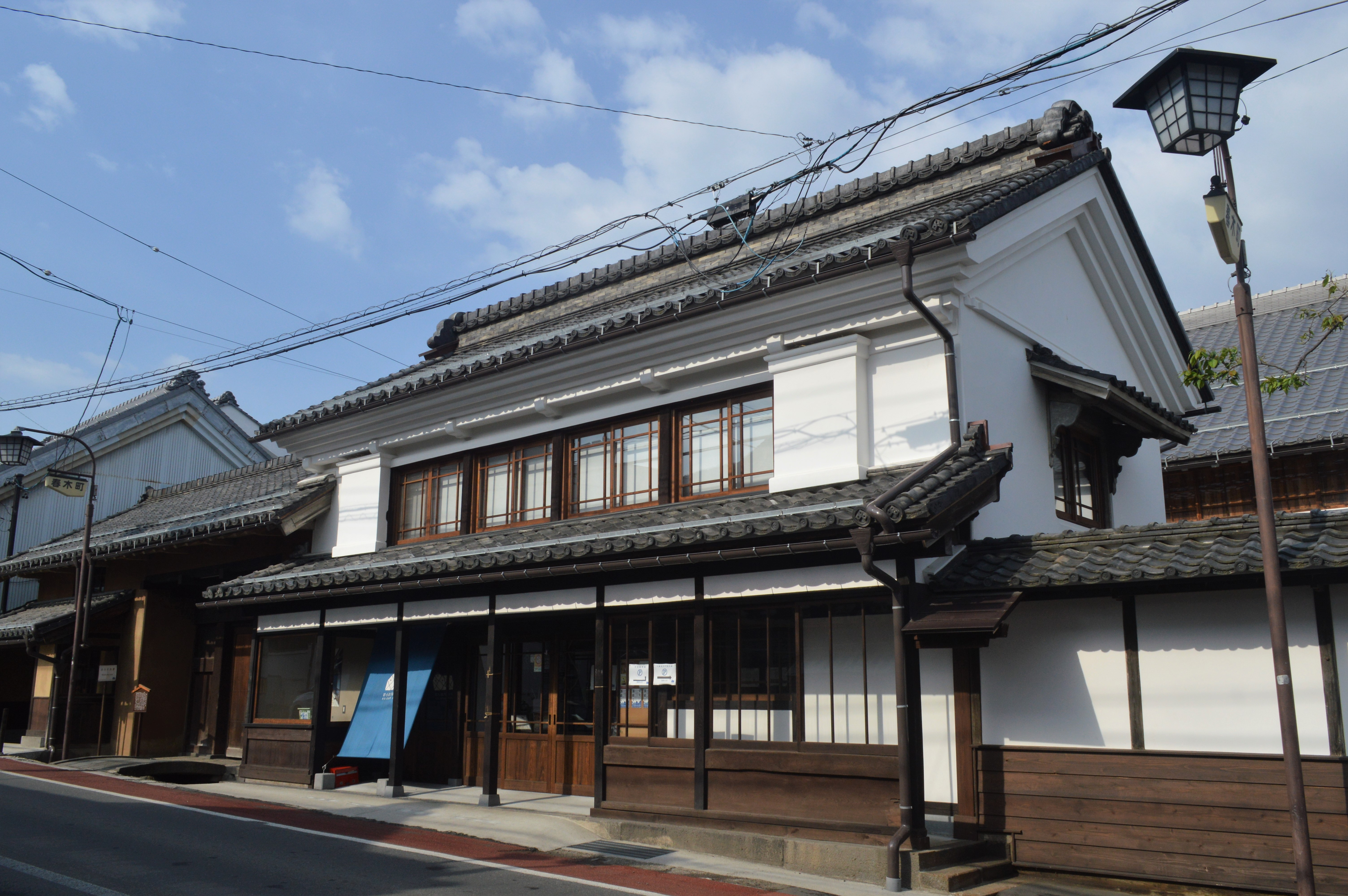 長野県須坂市の旧小田切家住宅。須坂市指定有形文化財。